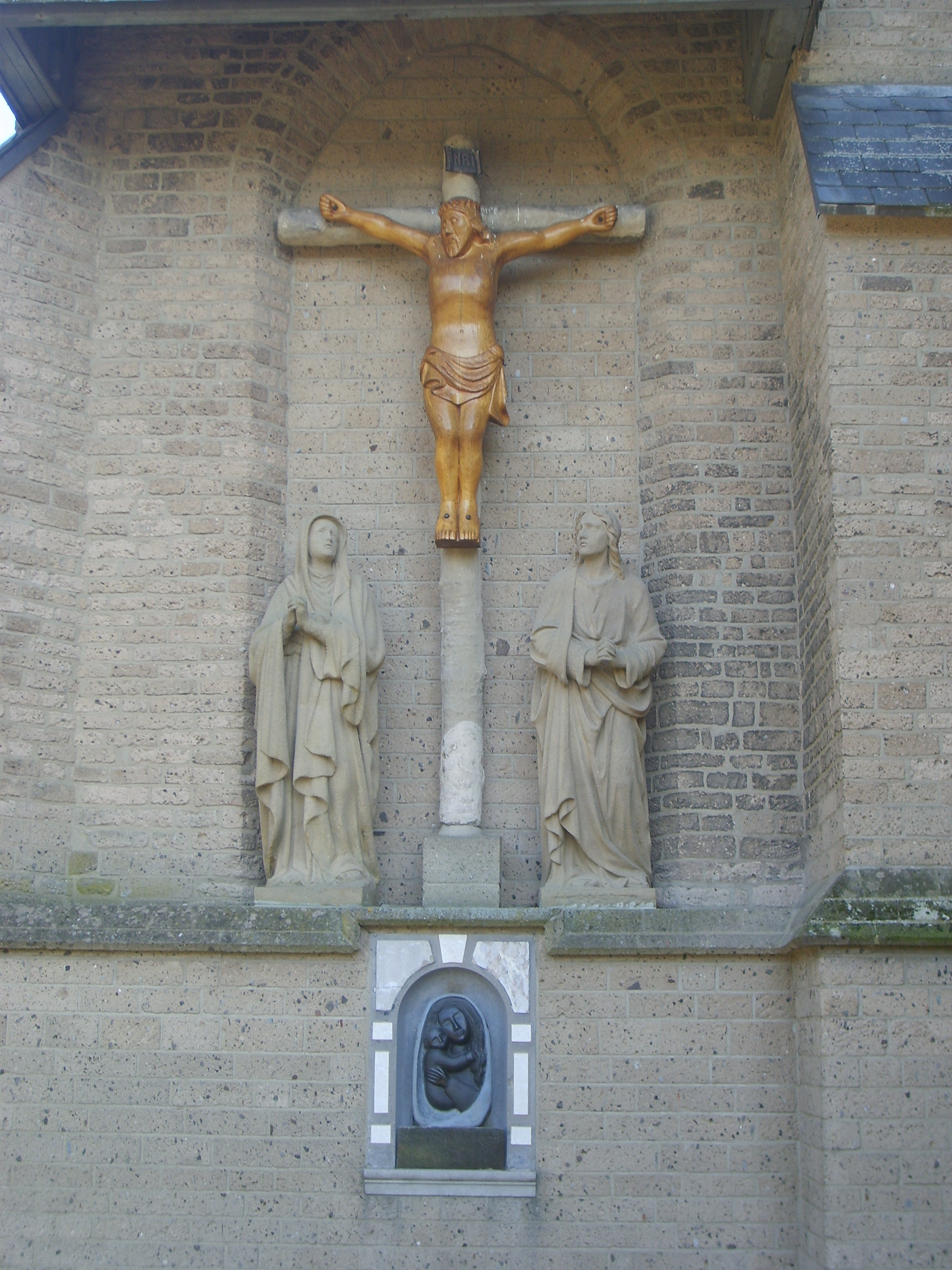 Kruisigingsgroep Sint-Andreaskerk Groessen